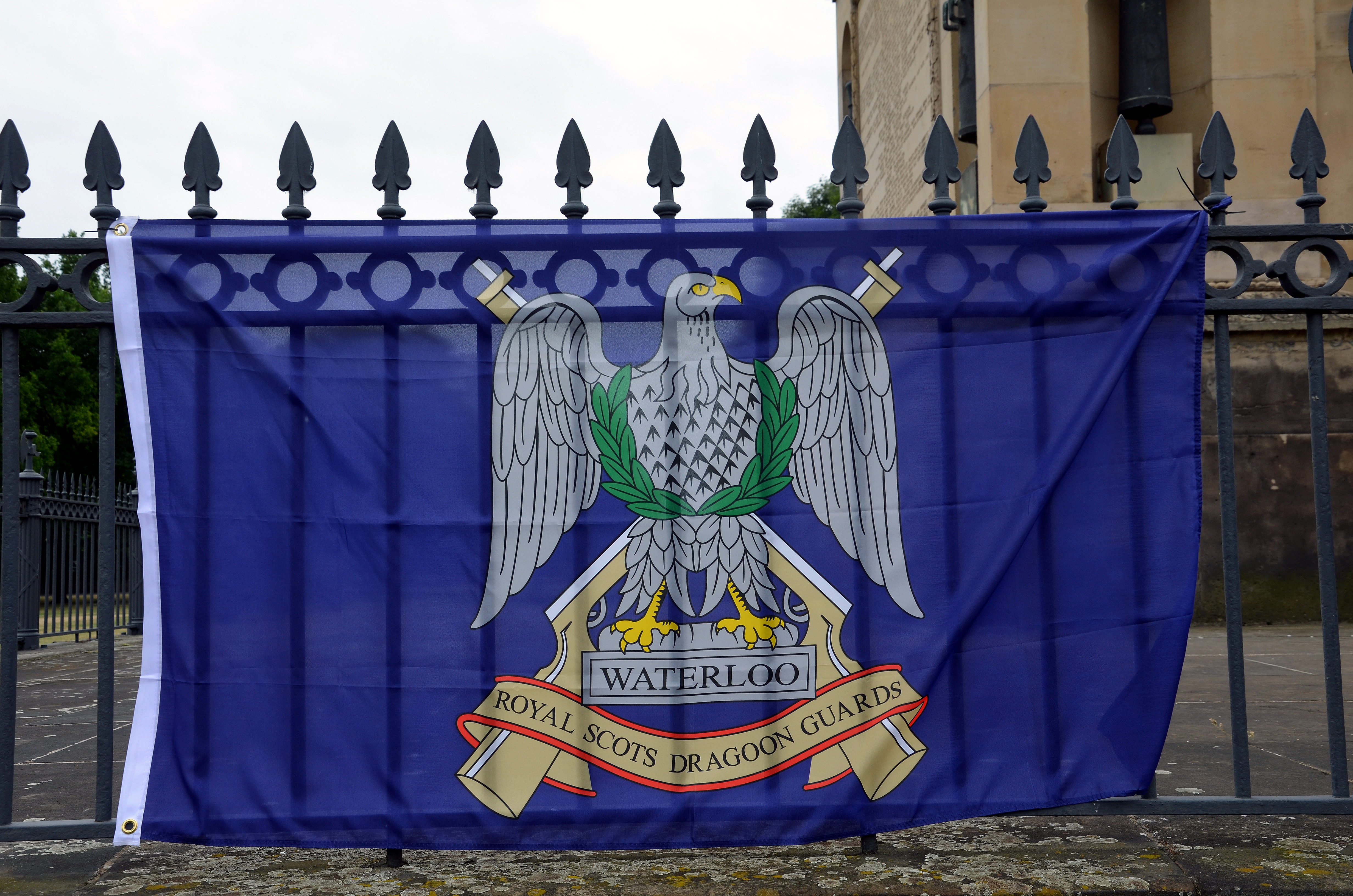 Zur 200sten Wiederkehr der Schlacht bei Waterloo (18. Juni 1815) hatte der Welfenbund e.V. gemeinsam mit Royal British Legion Hannover Branch e.V. zu einer Gedenkveranstaltung am 20. Juni 2015 an der Waterloosäule auf dem Waterlooplatz in Hannover geladen. An der Feierlichkeit mit Kranzniederlegung und musikalischer Umrahmung nahmen unter anderem auch Vertreter der Royal Scots Dragoon Guards teil, ferner die Schützenbruderschaft Das große Freie, die Freiwillige Feuerwehr Barfelde, Spielleute vom Musikzug der Freiwilligen Feuerwehr Bethel und Rheden sowie Vertreter der Loge Wilhelm zur Deutschen Treue ...